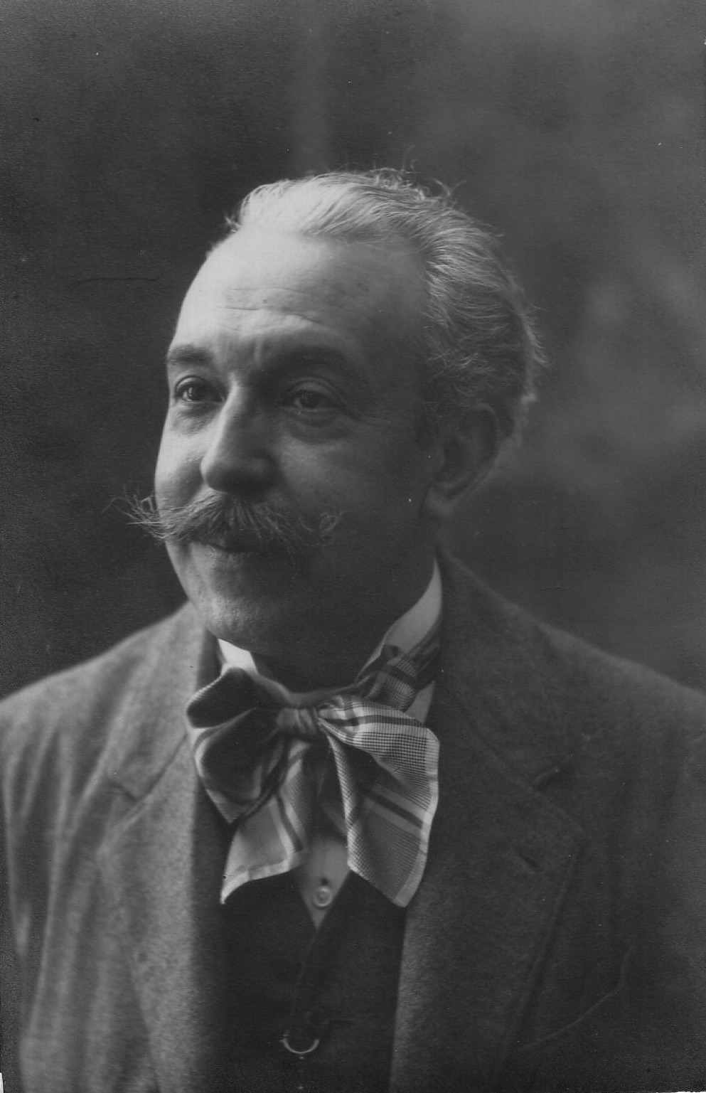 Fotografía de Eusebio Bosch i Humet, durante la década de los 1910s